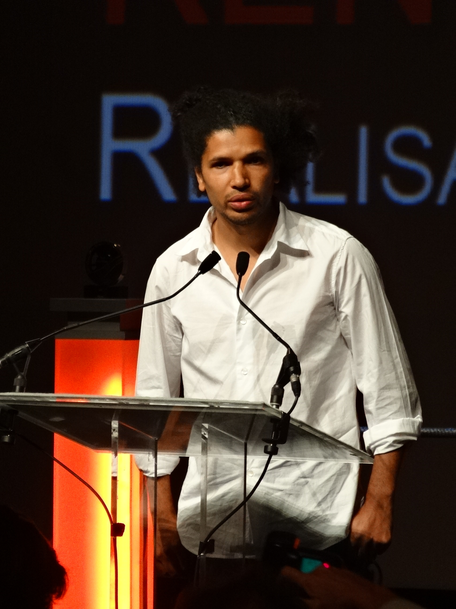 Rachid Djaïdani at Festival Deauville 2012